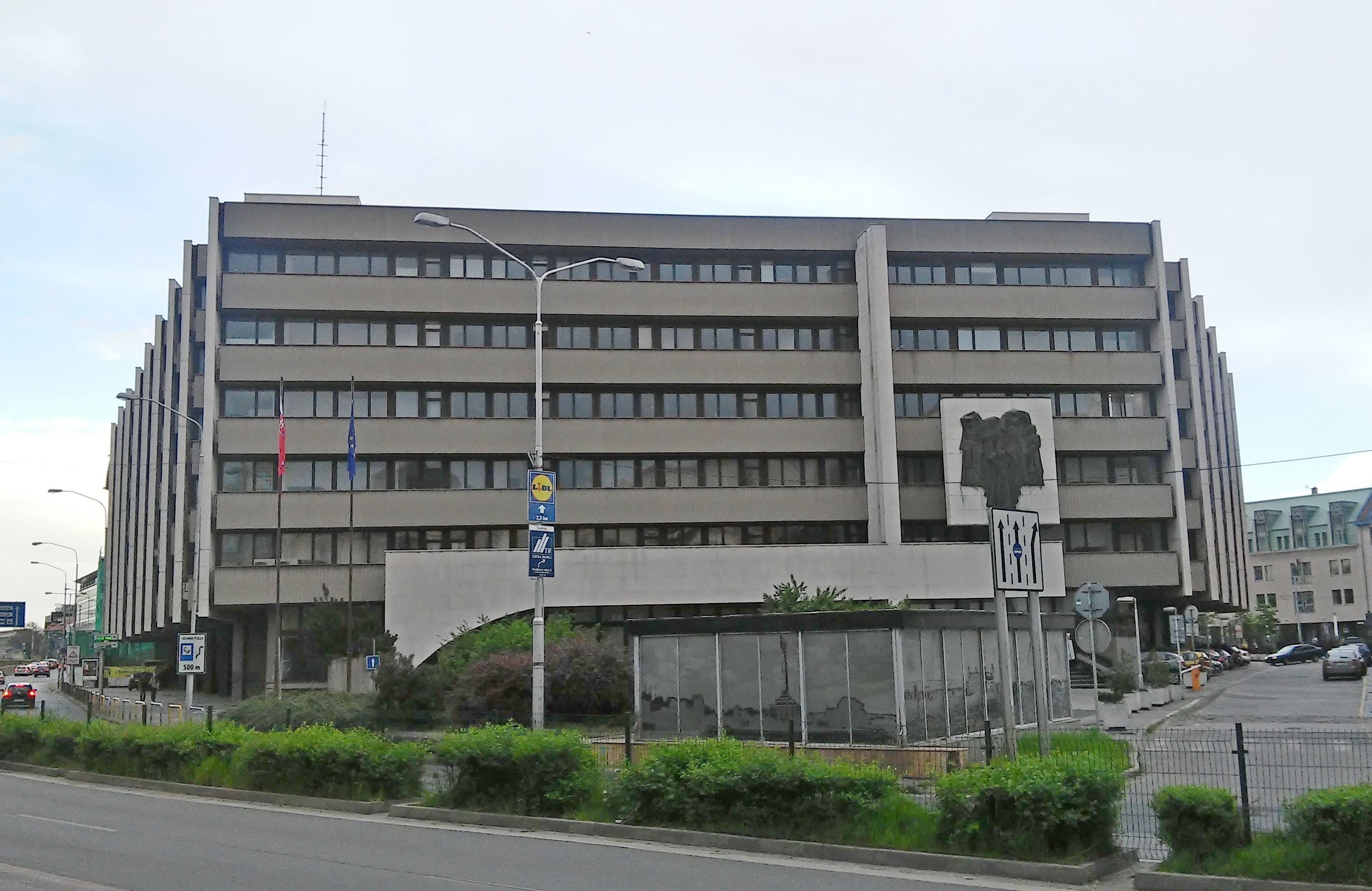 Najvyšší súd Slovenskej republiky